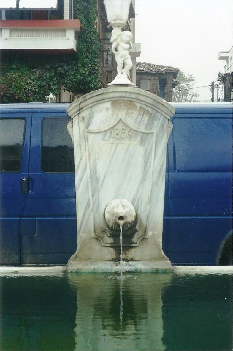 The main fountain in Celaliye with greek inscription.